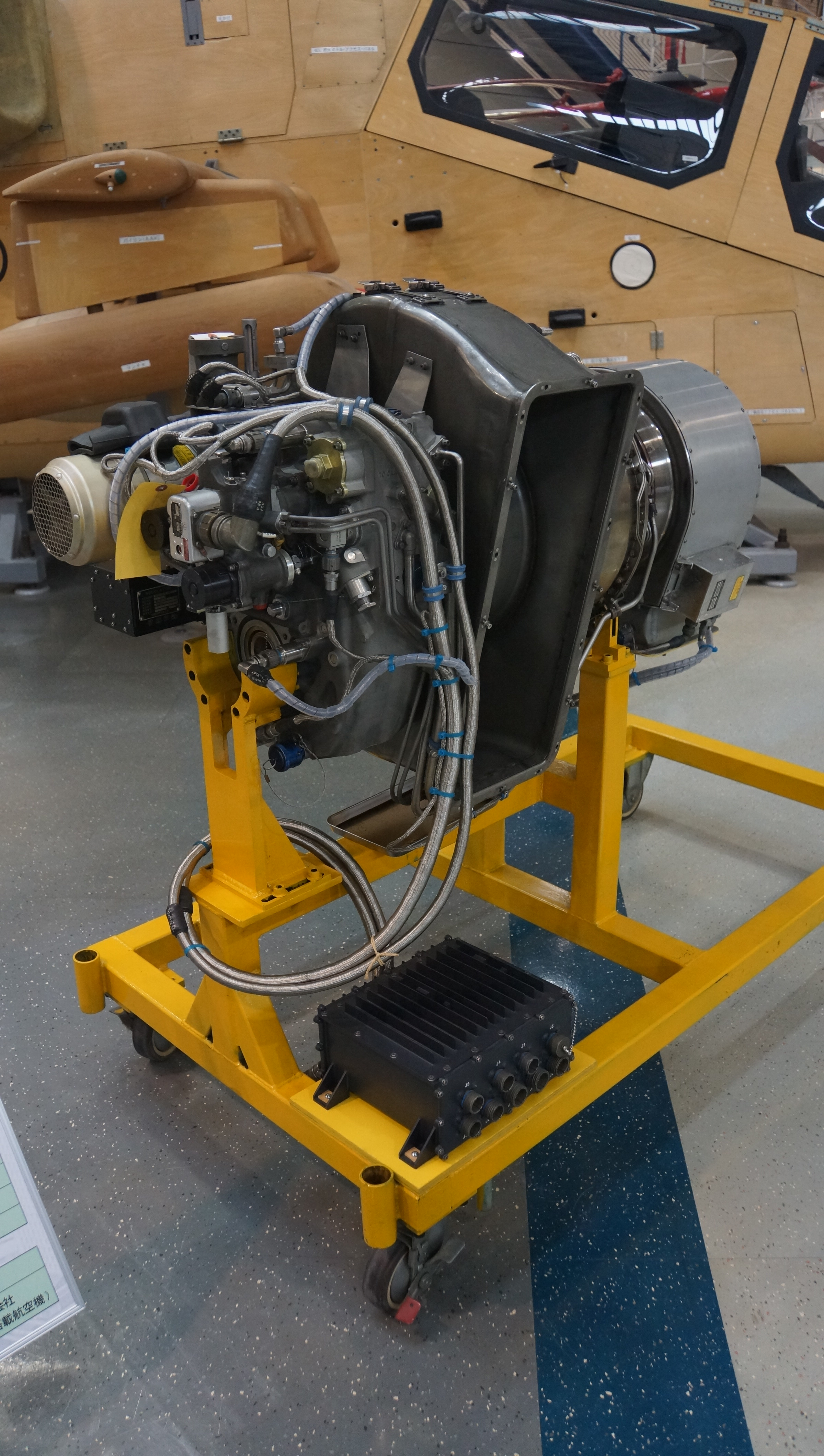 三菱MG5-110ターボシャフト・エンジン 左前面。2014年11月2日 かかみがはら航空宇宙科学博物館内にて。